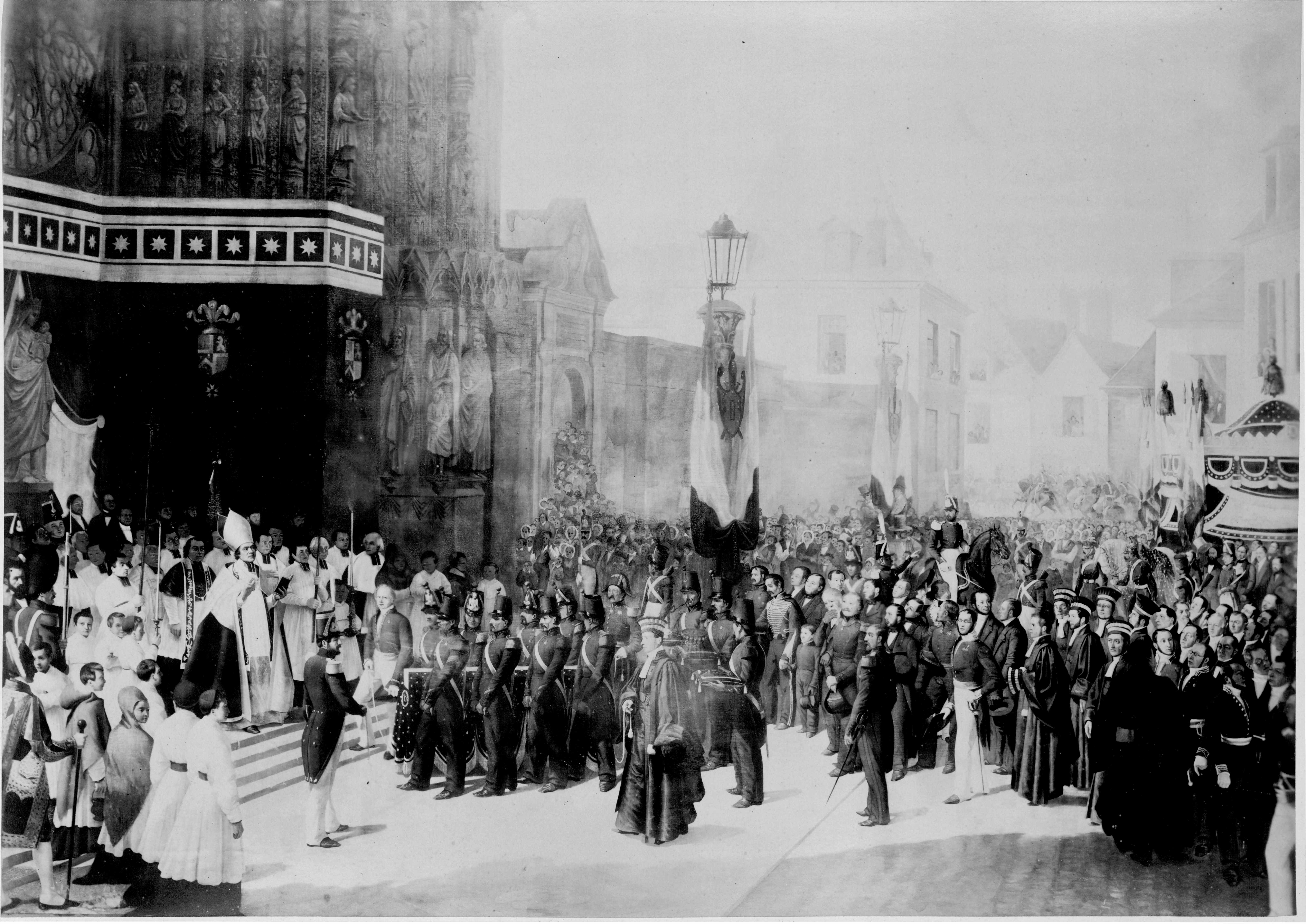 reproduction photographique de François Rothier d'un tableau de Victor Darjou qui se trouvait en la Mairie de Reims et qui a été détruit par l'incendie de celui-ci lors de la Grande Guerre. tirage sur papier albuminé de 37 par 51cm.